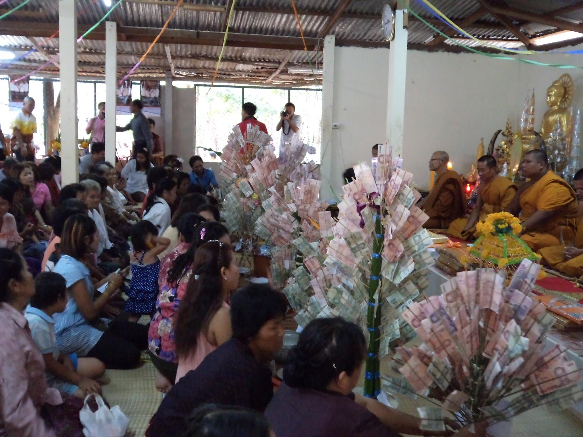 ชาวบ้านบ้านหนองอุ่มและผู้มิจิตศรัทธาร่วมกันทอดกฐินสำนักสงฆ์ป่าเลไลยก์